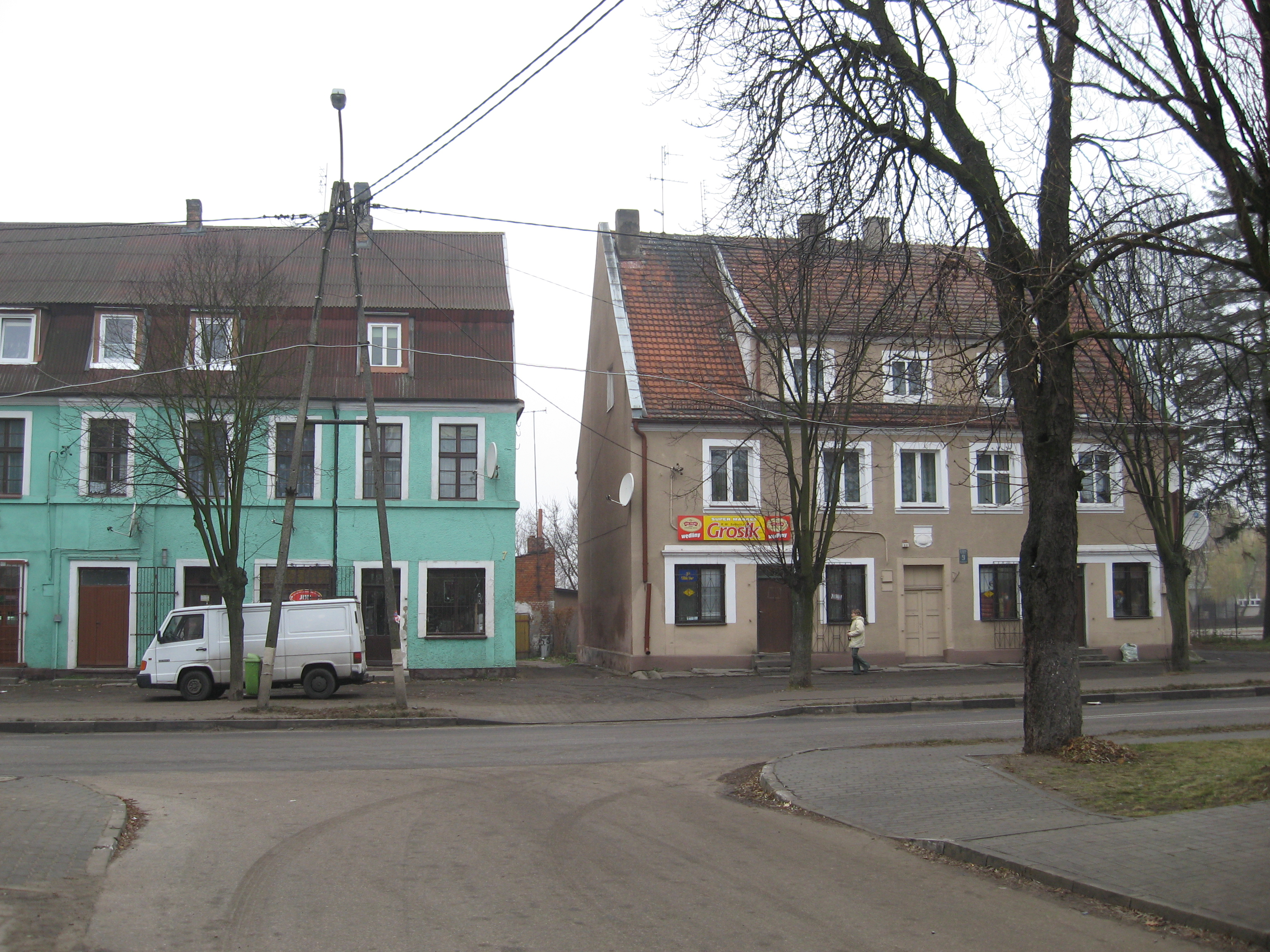 Iłowo-Osada - budynki przy ulicy Wyzwolenia